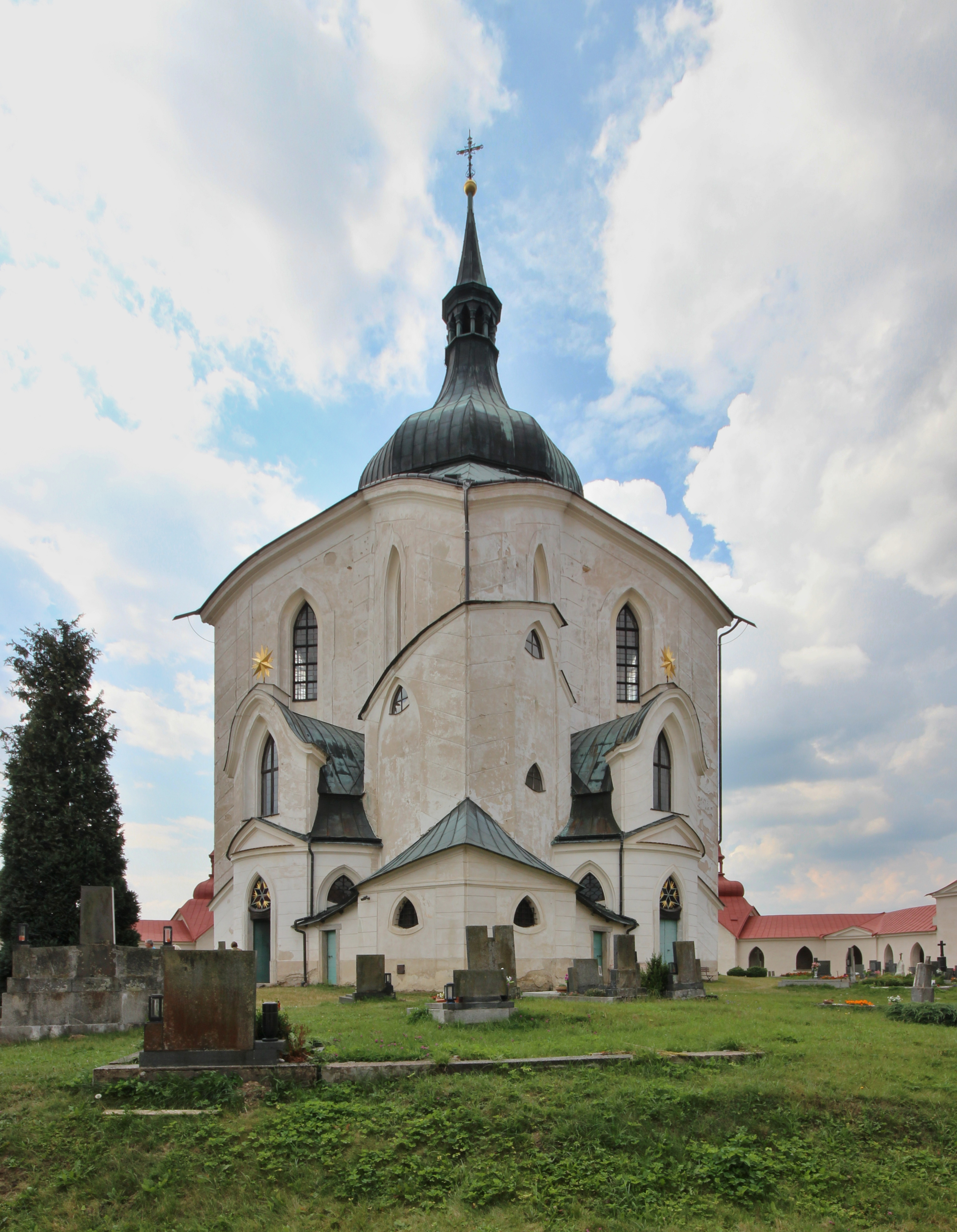 Poutní kostel sv. Jana Nepomuckého na Zelené hoře.